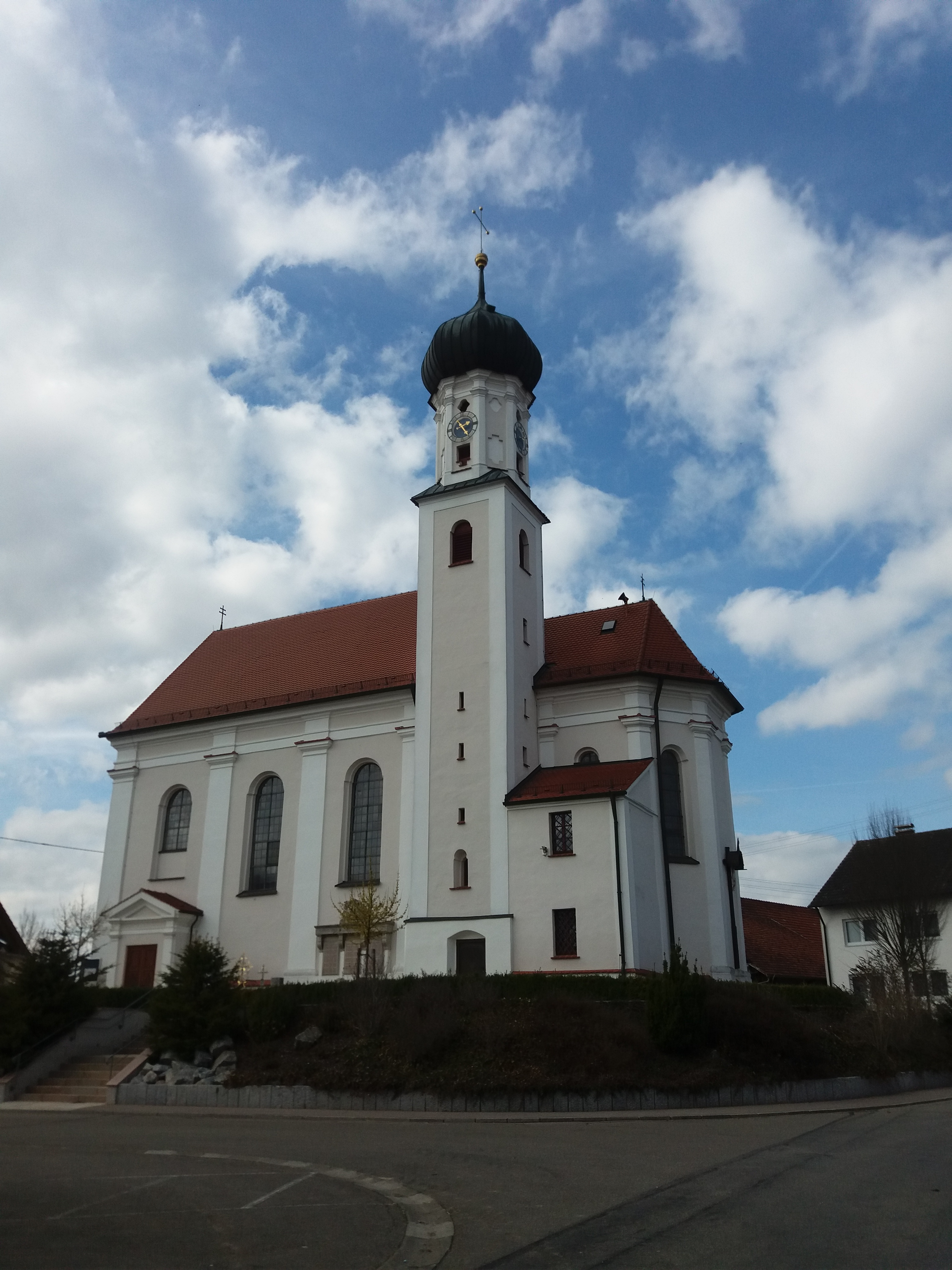 Katholische Kirche St. Nikolaus in Kleinkötz, Gemeinde Kötz, Landkreis Günzburg. Die Kirche ist ein Baudenkmal.